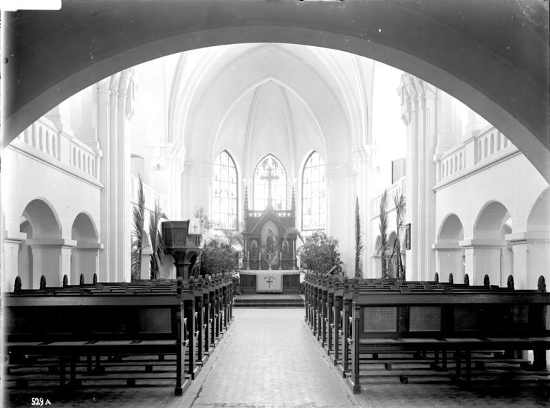 Inneres der ev. Kirche in Daressalam